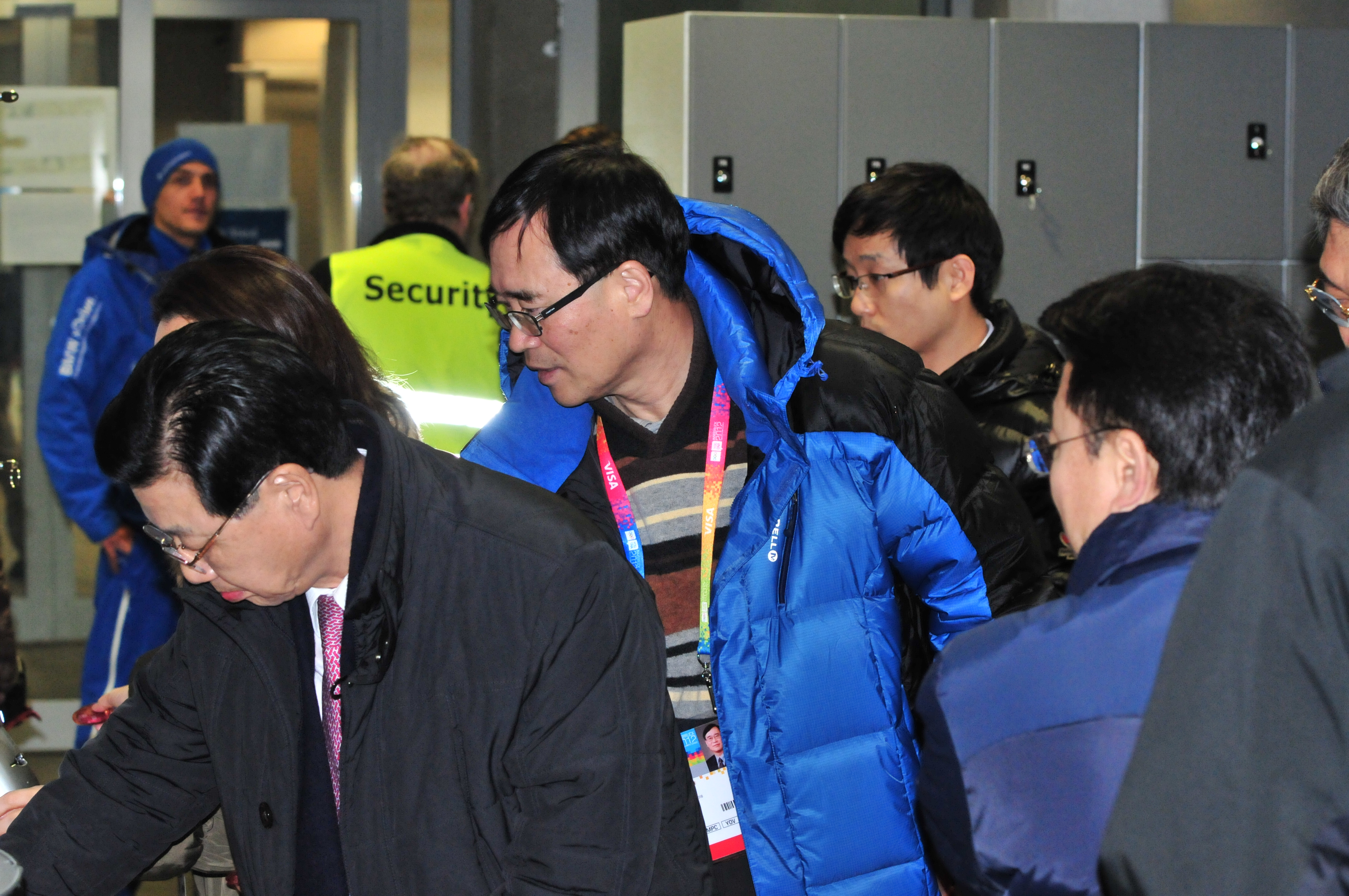 1. Jugendolympiade 2012 Innsbruck Erste Olympische Jugend- Winterspiele 201213. bis 22. Jänner in Innsbruck Dieses Foto wurde durch die Unterstützung von Wikimedia Österreich und die Twoonix Software GmbH ermöglicht.